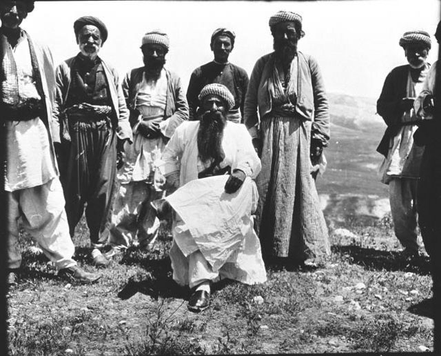 მირ ალი ბეგ